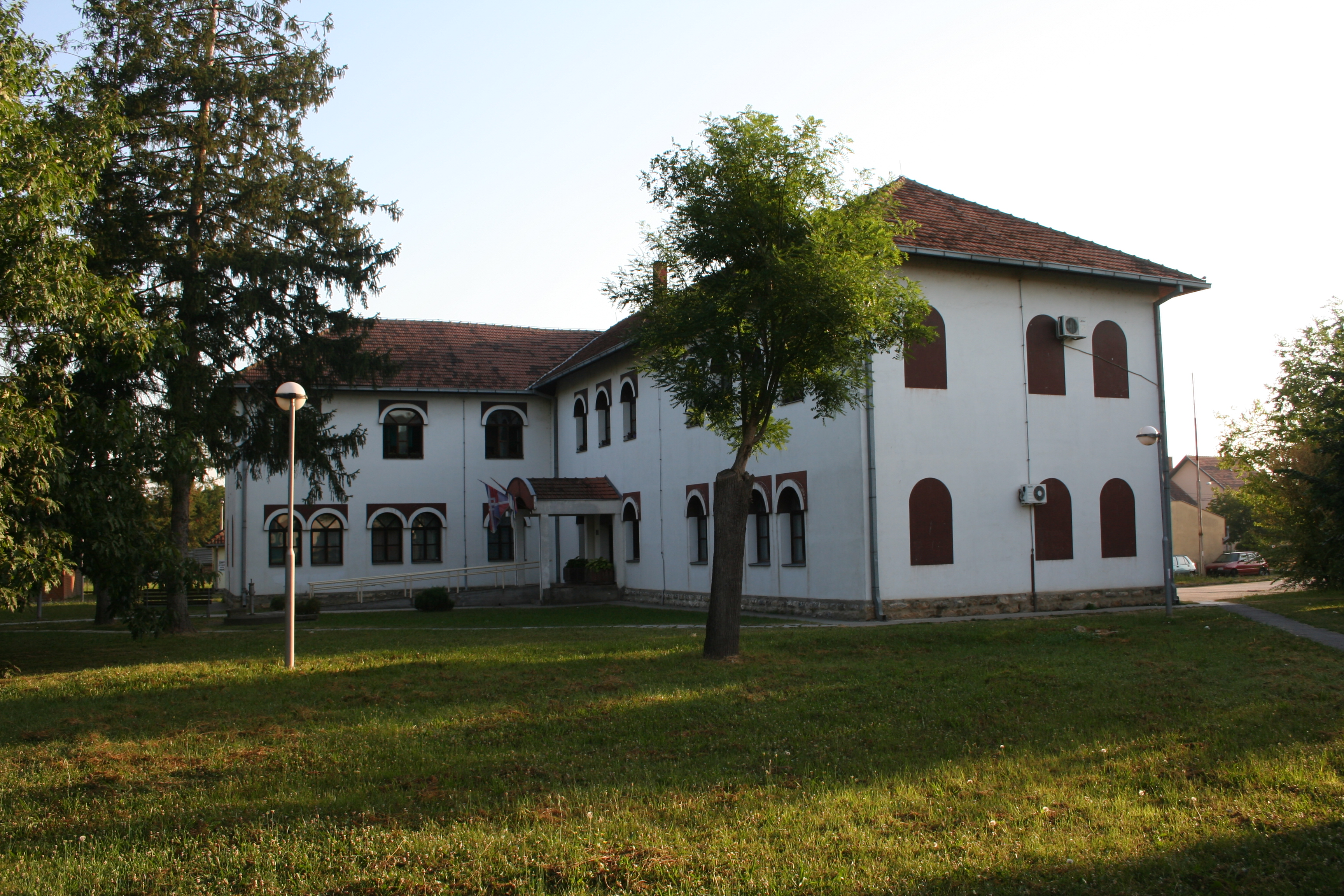 Zgrada SO Koceljeva